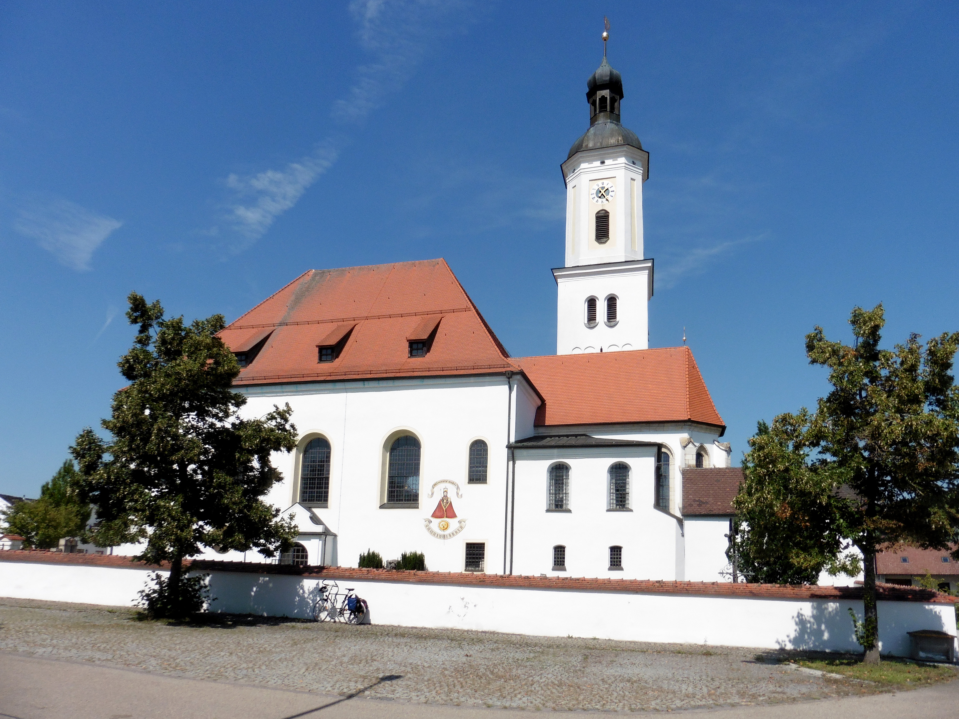 Wallfahrtskirche St. Salvator in Bettbrunn bei Kösching. Ansicht von Süden.